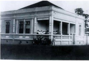 Instituto Baronesa de Resende -Vila Resende -Piracibaca-SP